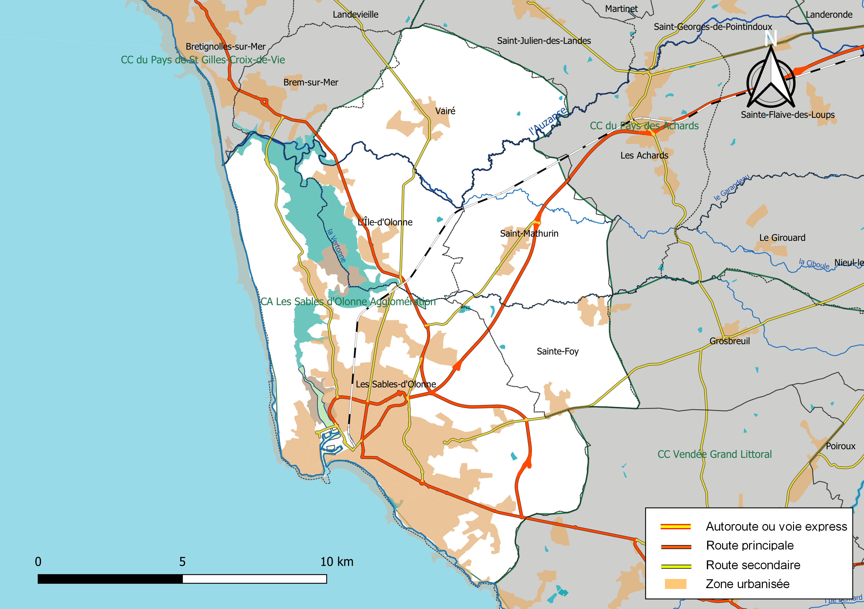 Carte géographique de l'intercommunalité Les Sables-d'Olonne-Agglomération, département de la Vendée, France. Composition au 1er janvier 2019.